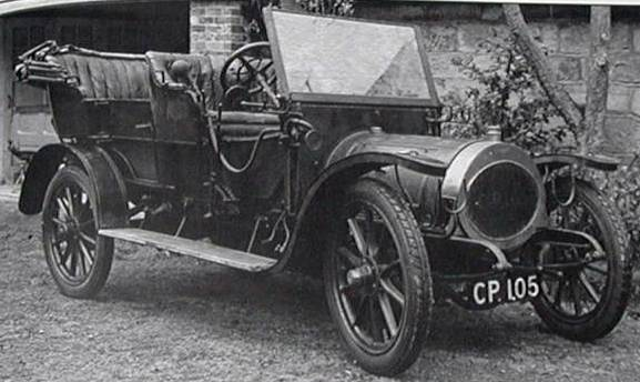 Een Germain uit nl:1905, model Chainless 14/20 pk, met een 2929 cc motor.